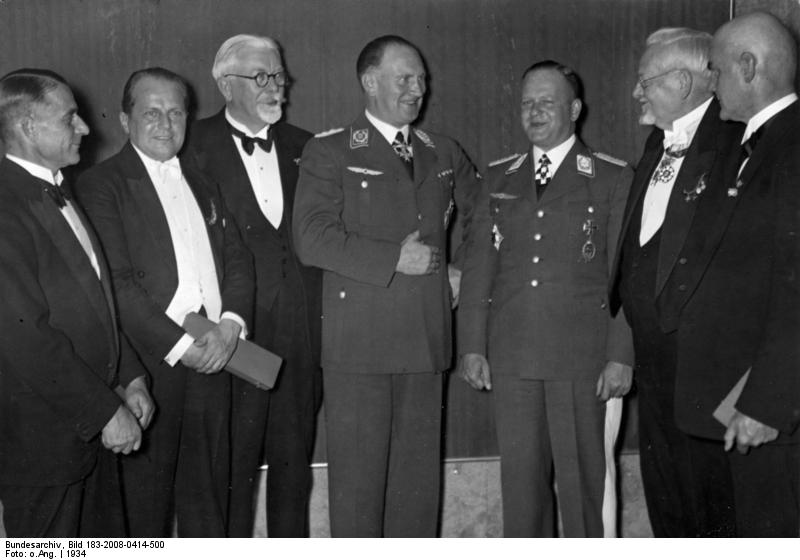 Berlin, Fest der Flieger, Ehrungen Fest der Flieger 1934 im Zoo Pioniere der Luftfahrt wurden geehrt: von Links nach rechts: Thelen, Mackenthun, Geh.Rat Schütte, Bruno Lörzer (Präsident des DLV), Staatssekr. Milch, Prof. v. Parseval und Hans Grade. 41587-34 Abgebildete Personen: Grade, Hans: Flugpionier, Deutschland Mackenthun, Walter von: Leutnant, 1. Militärflieger, Deutschland Parseval, August von Prof. Dr.: Major, Luftschiffkonstrukteur, Luftschiffer, Deutschland